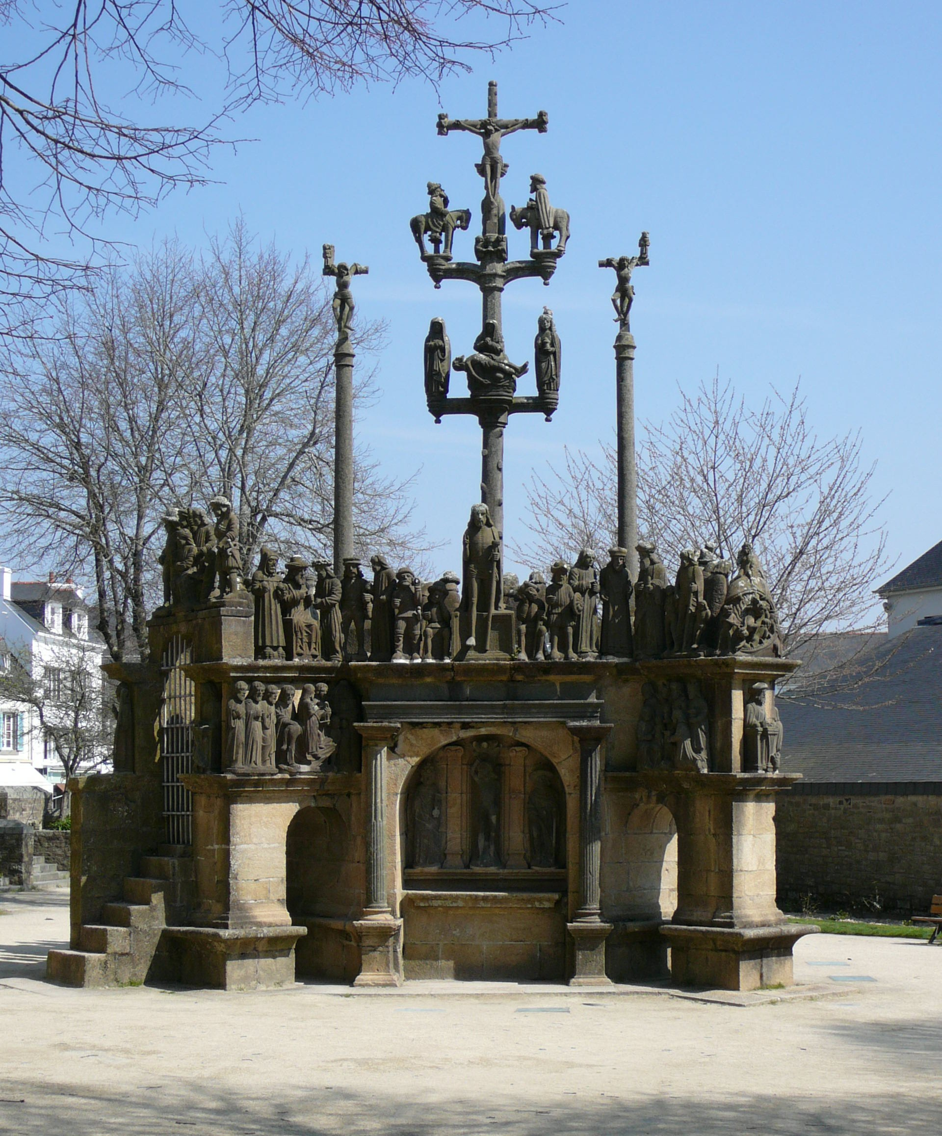 Calvario a Plougastel-Daoulas (Finisterra, Francia)